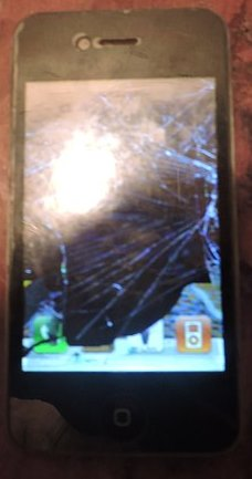 Разбитый ЖК-дисплей смартфона